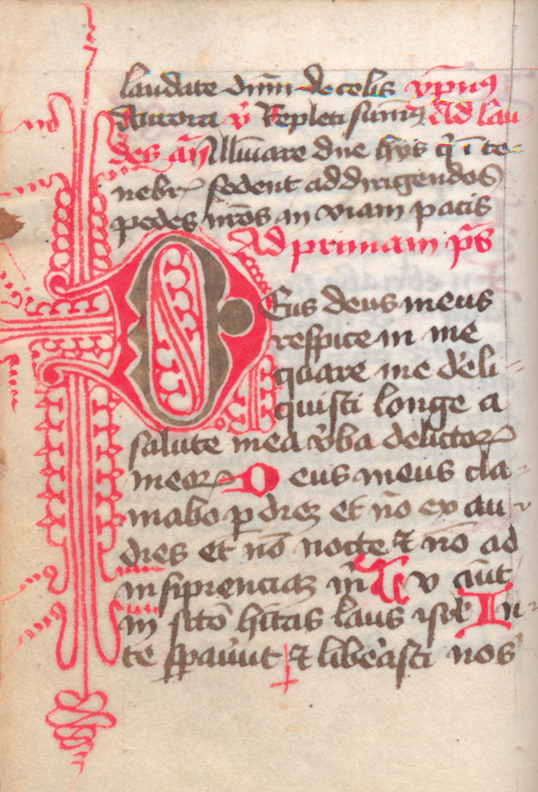 Molitvenik